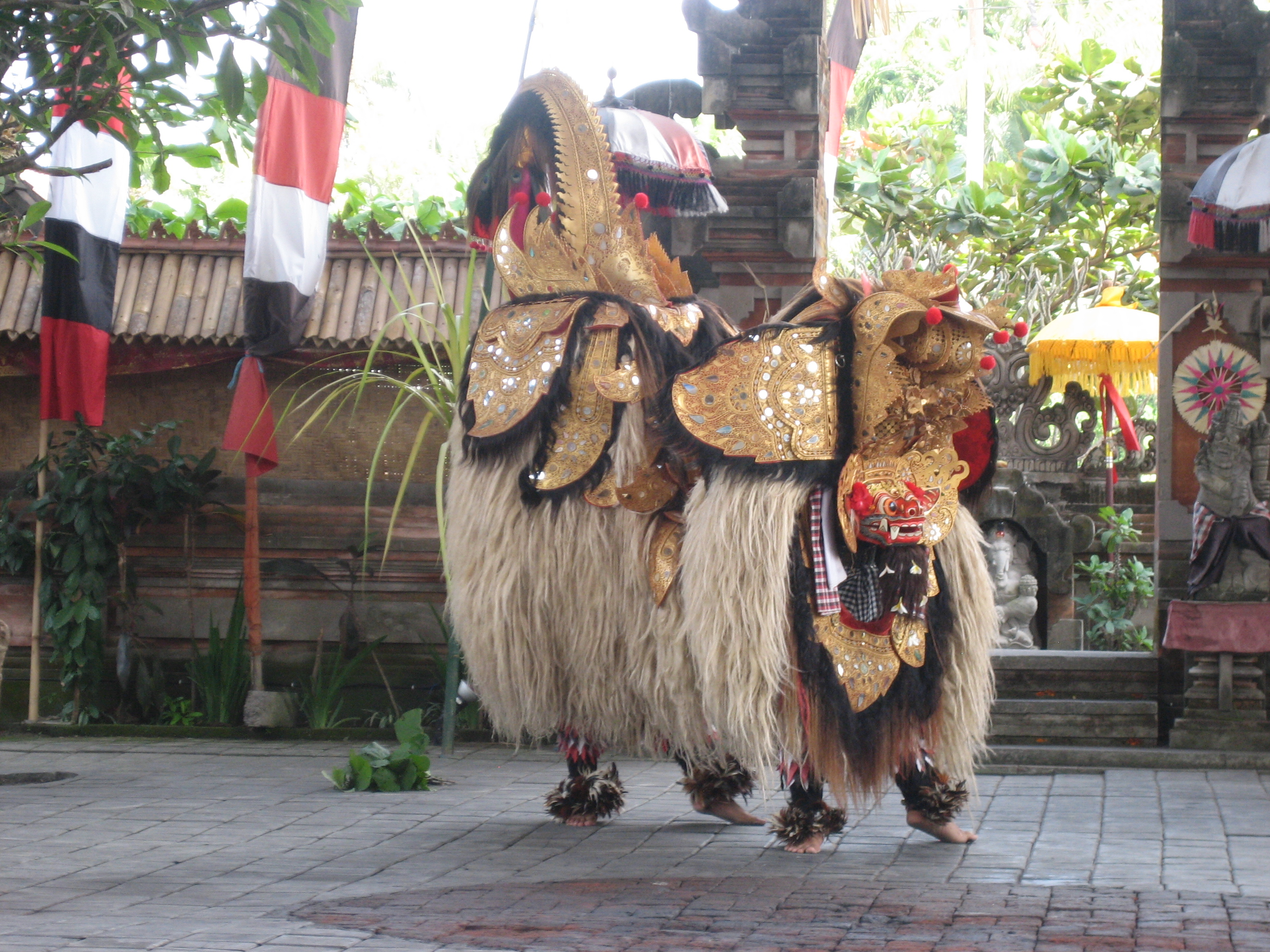 Le "barong" dans la danse traditionnelle du barong à Bali